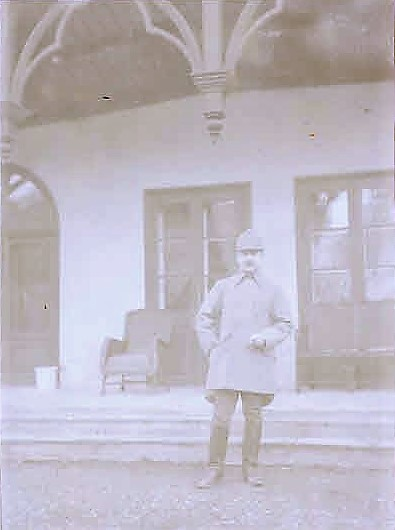 Станція Палагичі 1